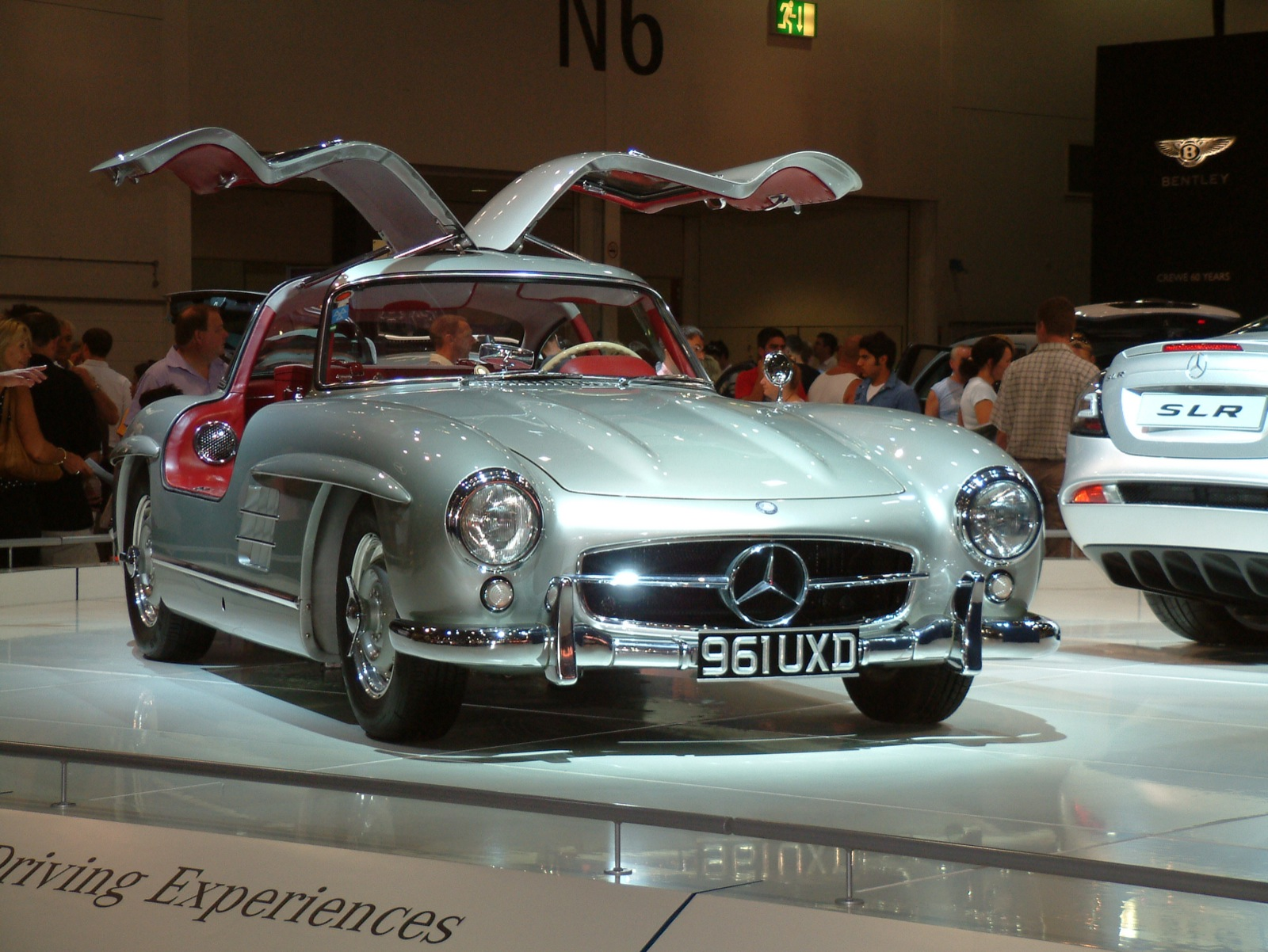 Gullwing